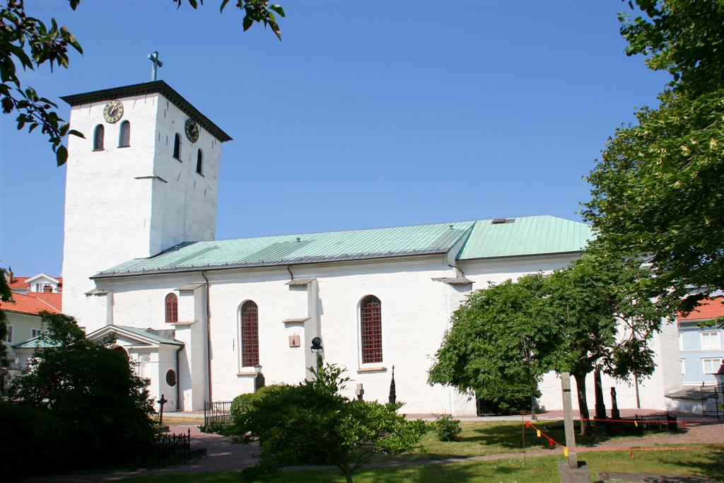 Foto: Tor Svensson